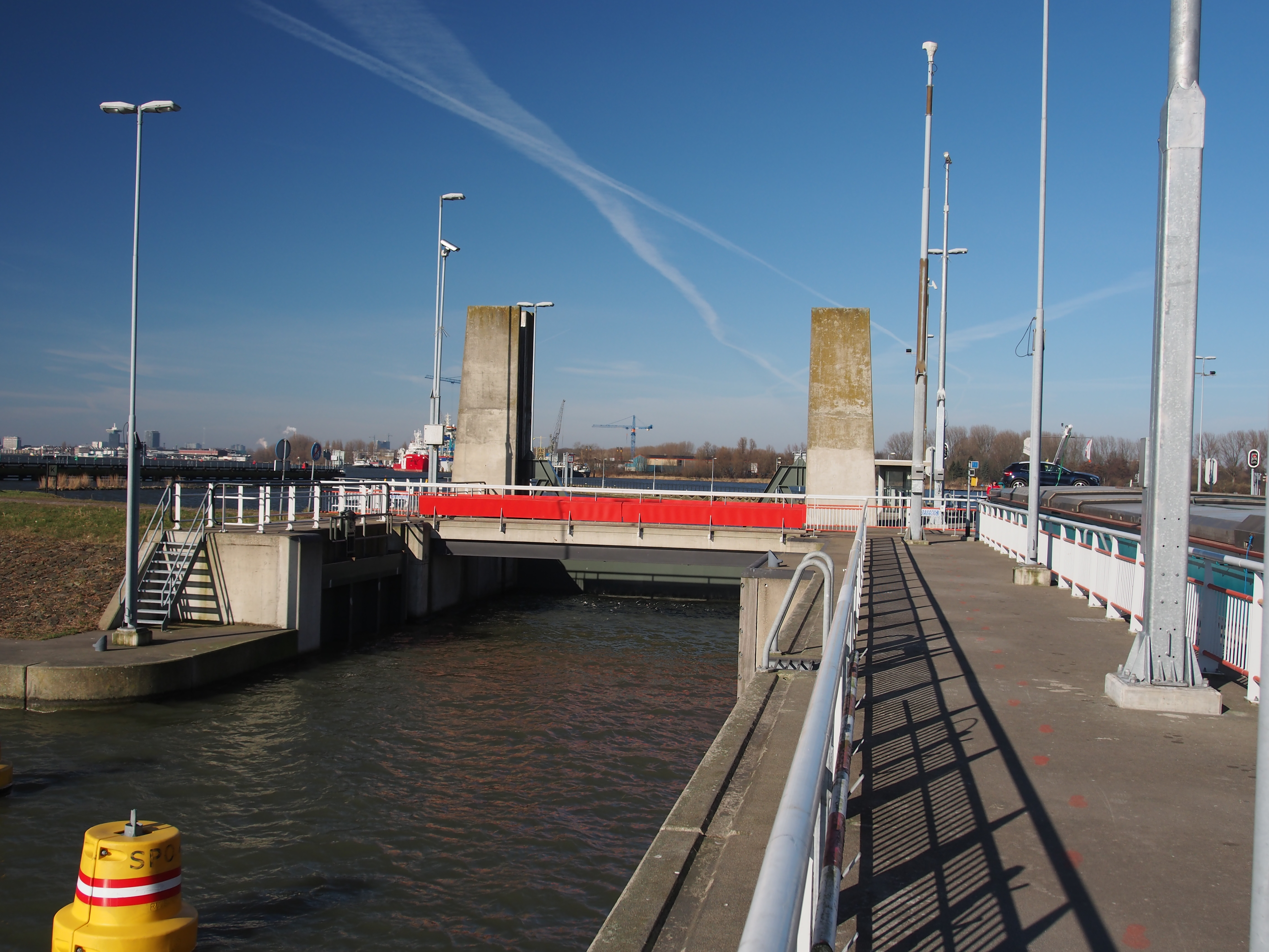 Oranjesluizen, Amsterdam.